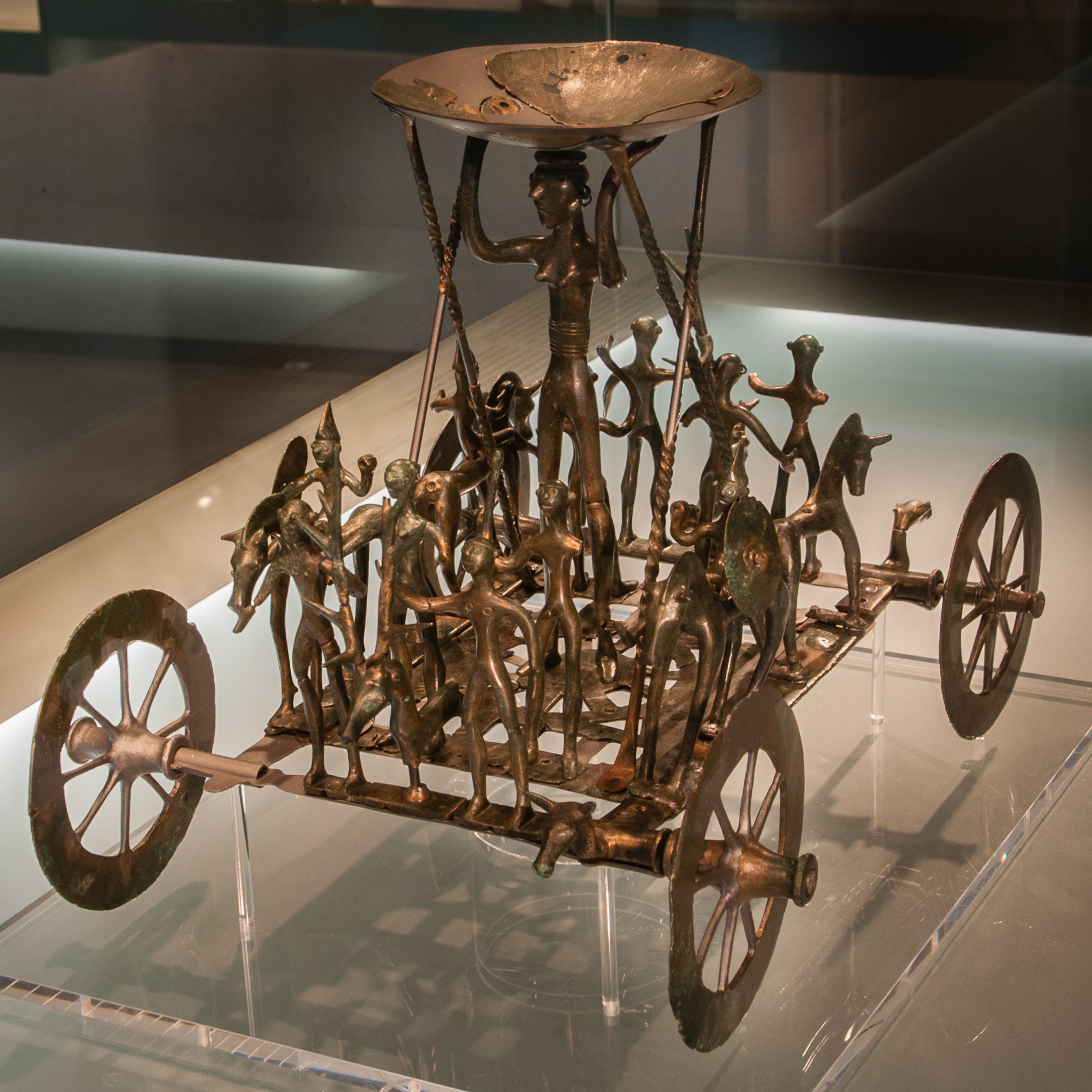 Der Kultwagen von Strettweg im Archäologiemuseum in Graz, Österreich.